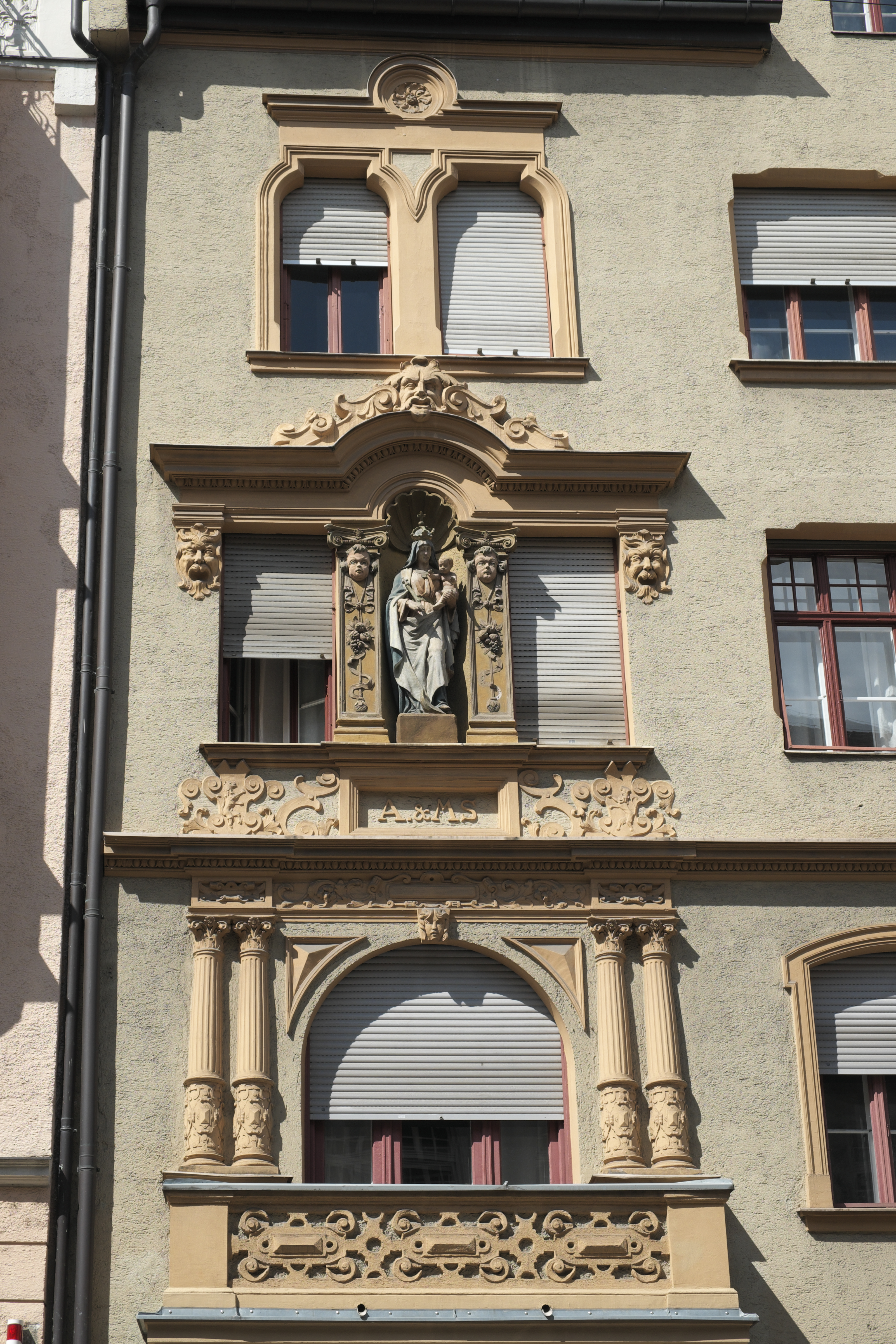 Mietshaus in der Liebherrstraße 8 im Lehel im Stadtbezirk Altstadt-Lehel in München (Bayern/Deutschland), um 1904 von August Spies und Adolf Wentzel gebaut